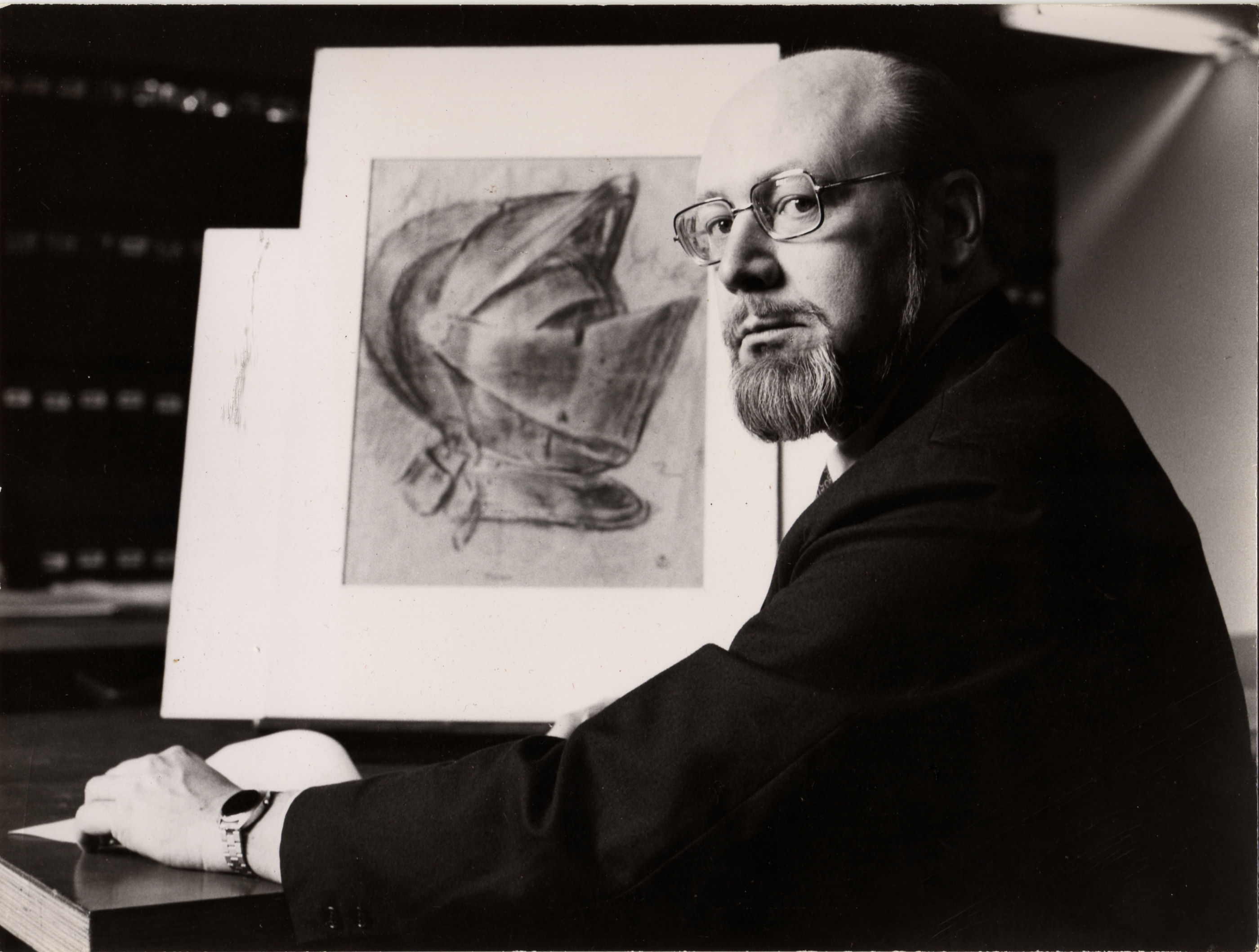 W.R. Rearick